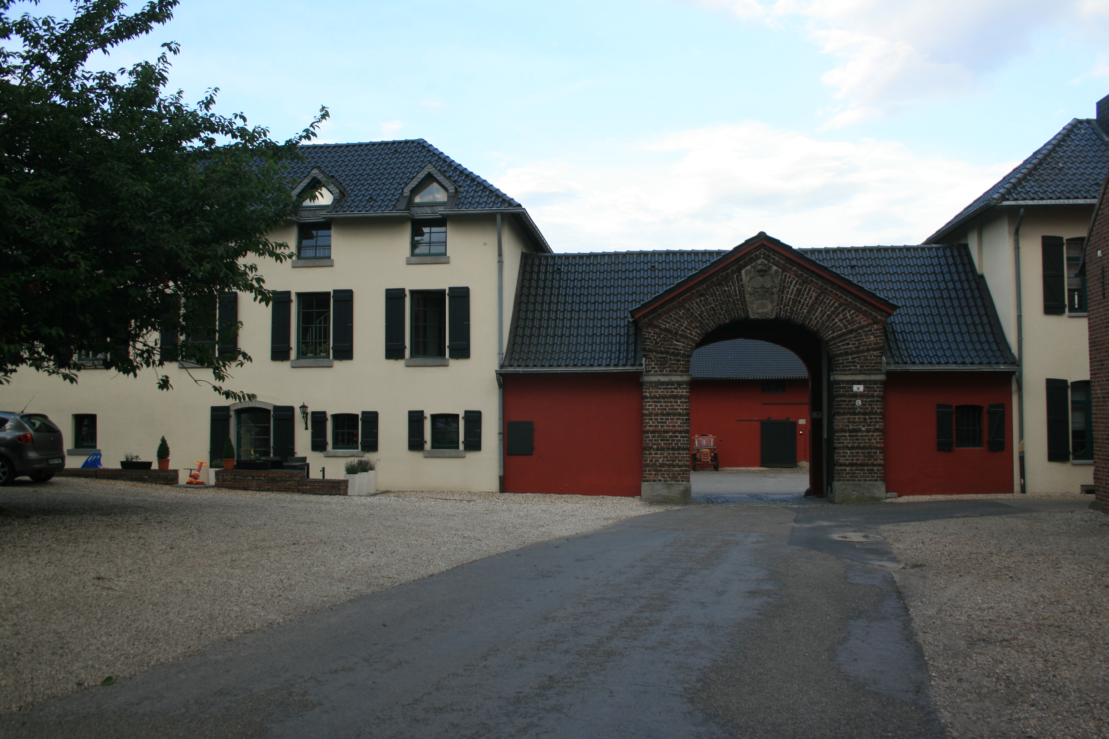 Torbau des Wirtschaftshofs von Schloss Breill in Geilenkirchen